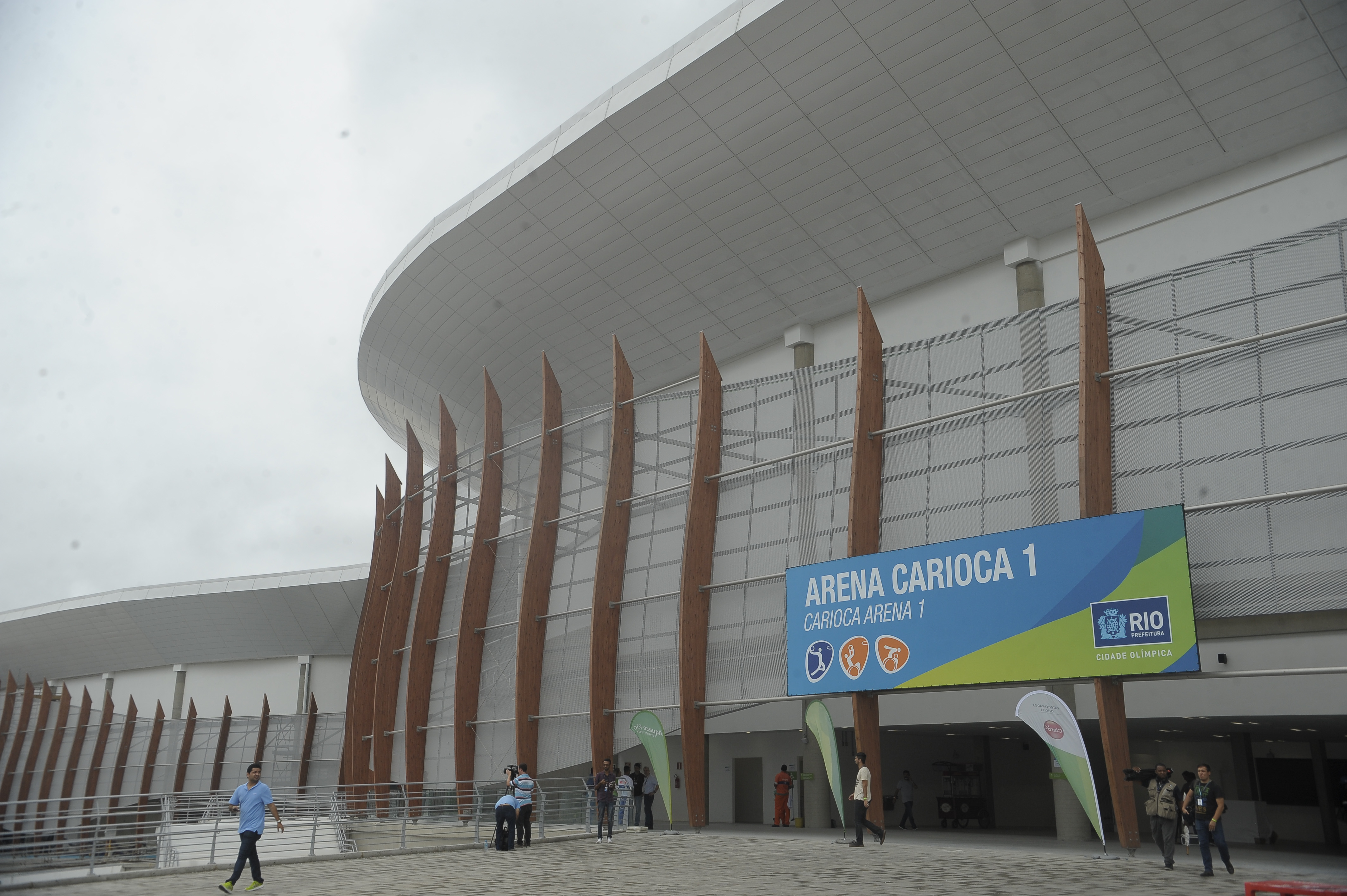 Inaugurazione del'Arena Carioca 1